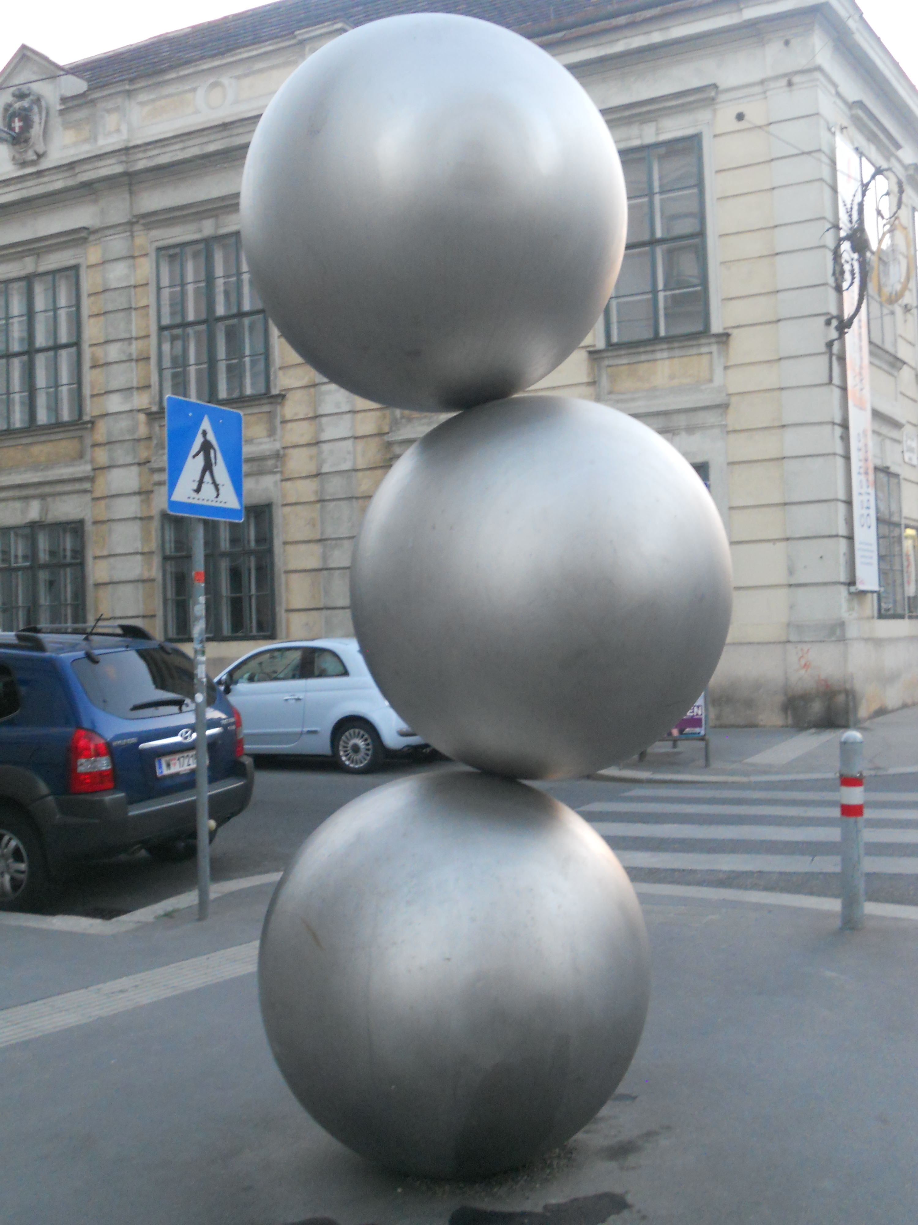 Metallskulptur "N.I.C. - nature is cool", im Hintergrund das Palais Schönborn i.c-nature-is-cool .